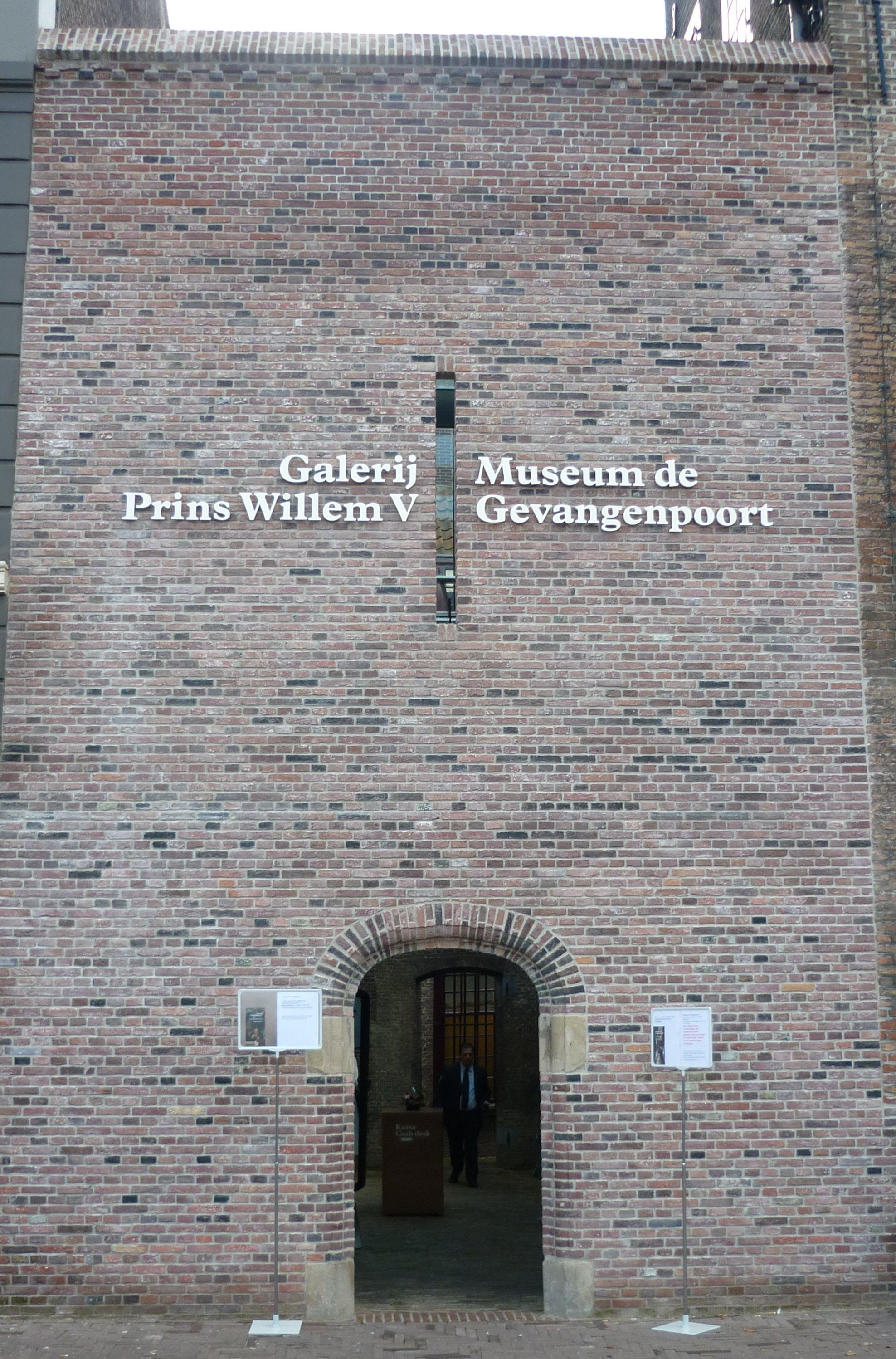 Gevangenpoort Den Haag